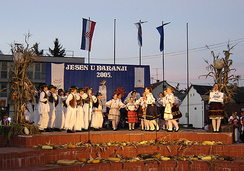 Jesen u Baranji, Beli Manastir